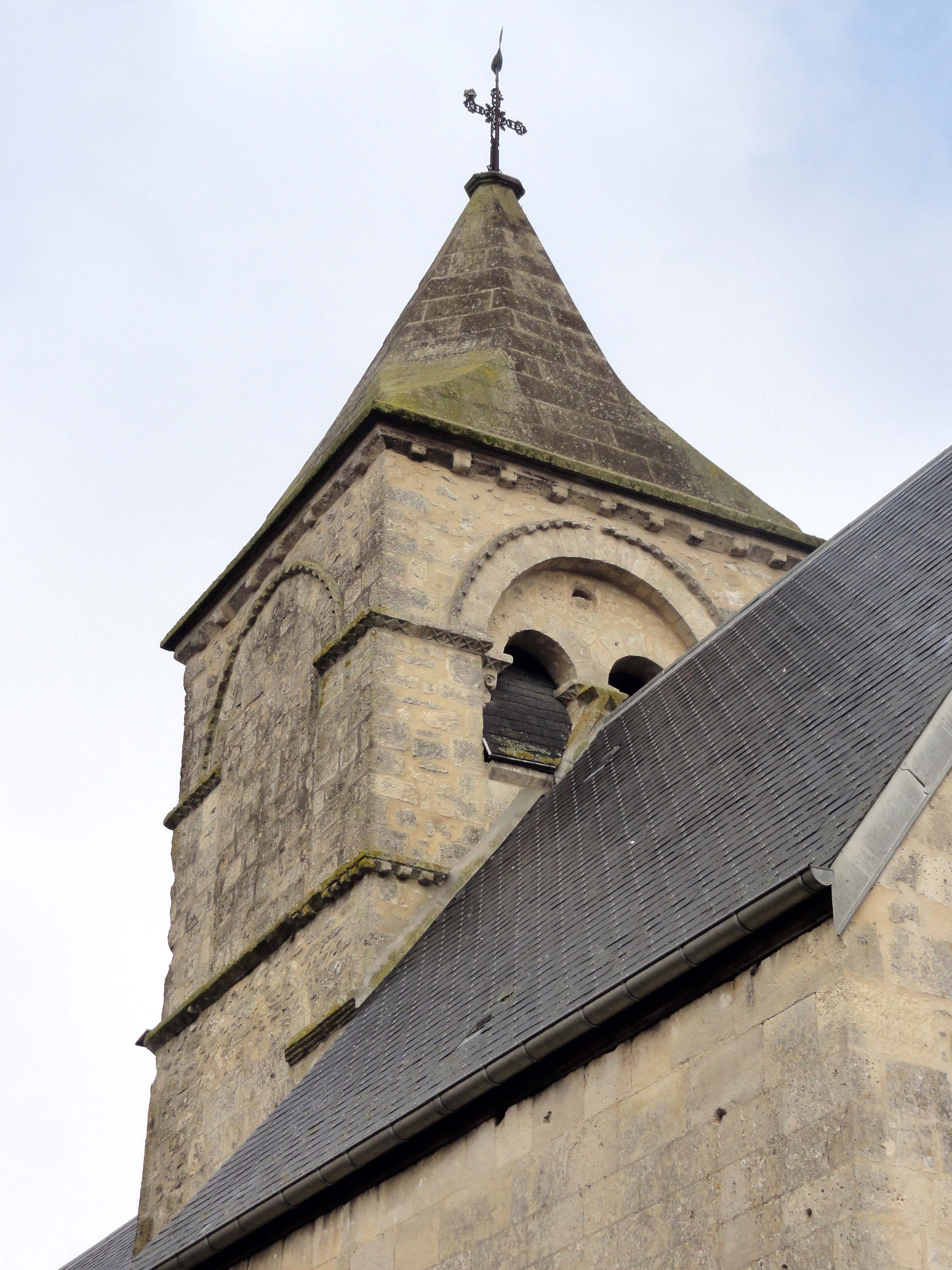 Chapelle Saint-Christophe-et-Saint-Jacques d'Auvillers - voir titre.